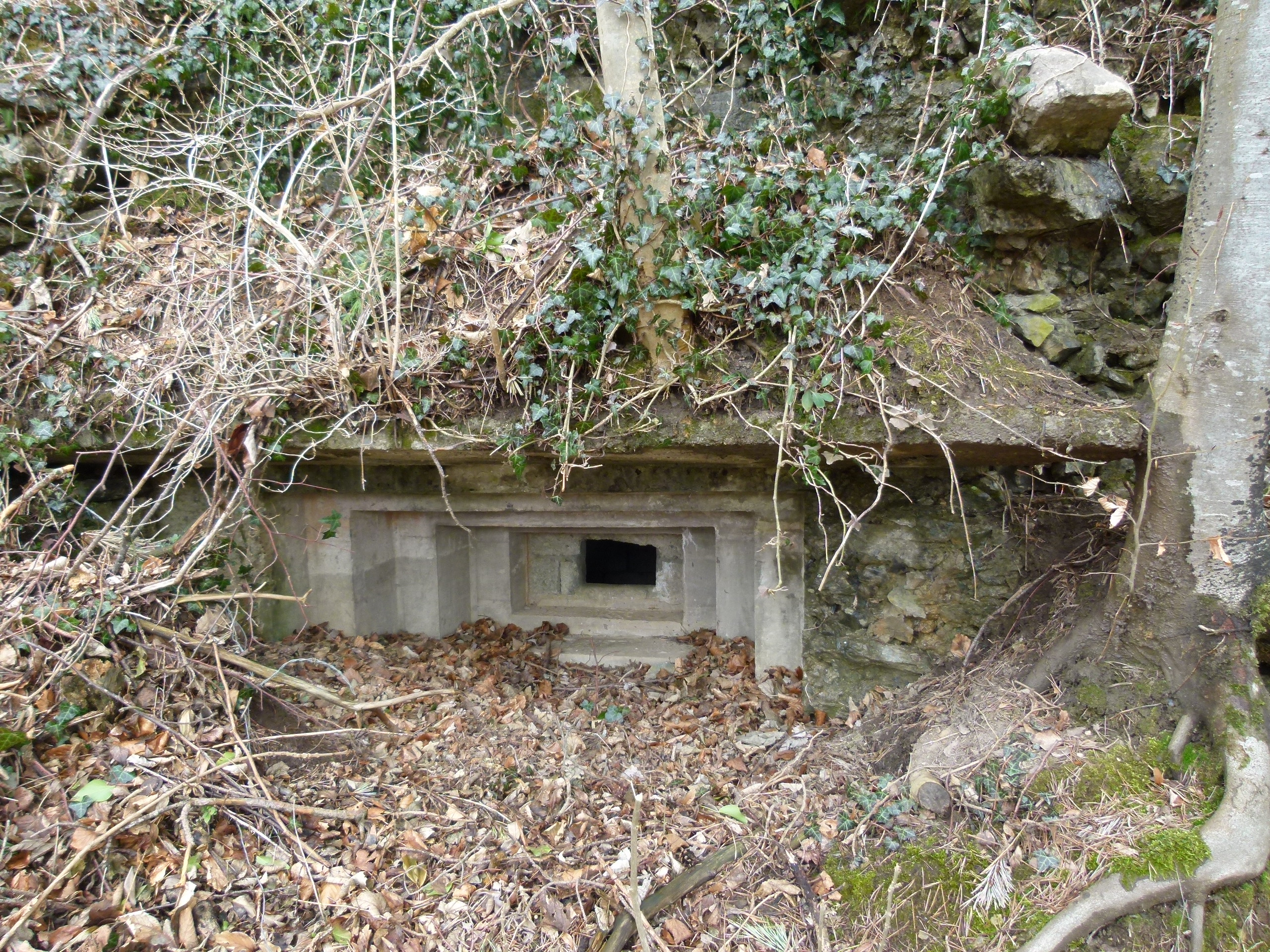 Fortificació feta durant la dictadura del general Franco al Pirineu català (zona de resistència 36)